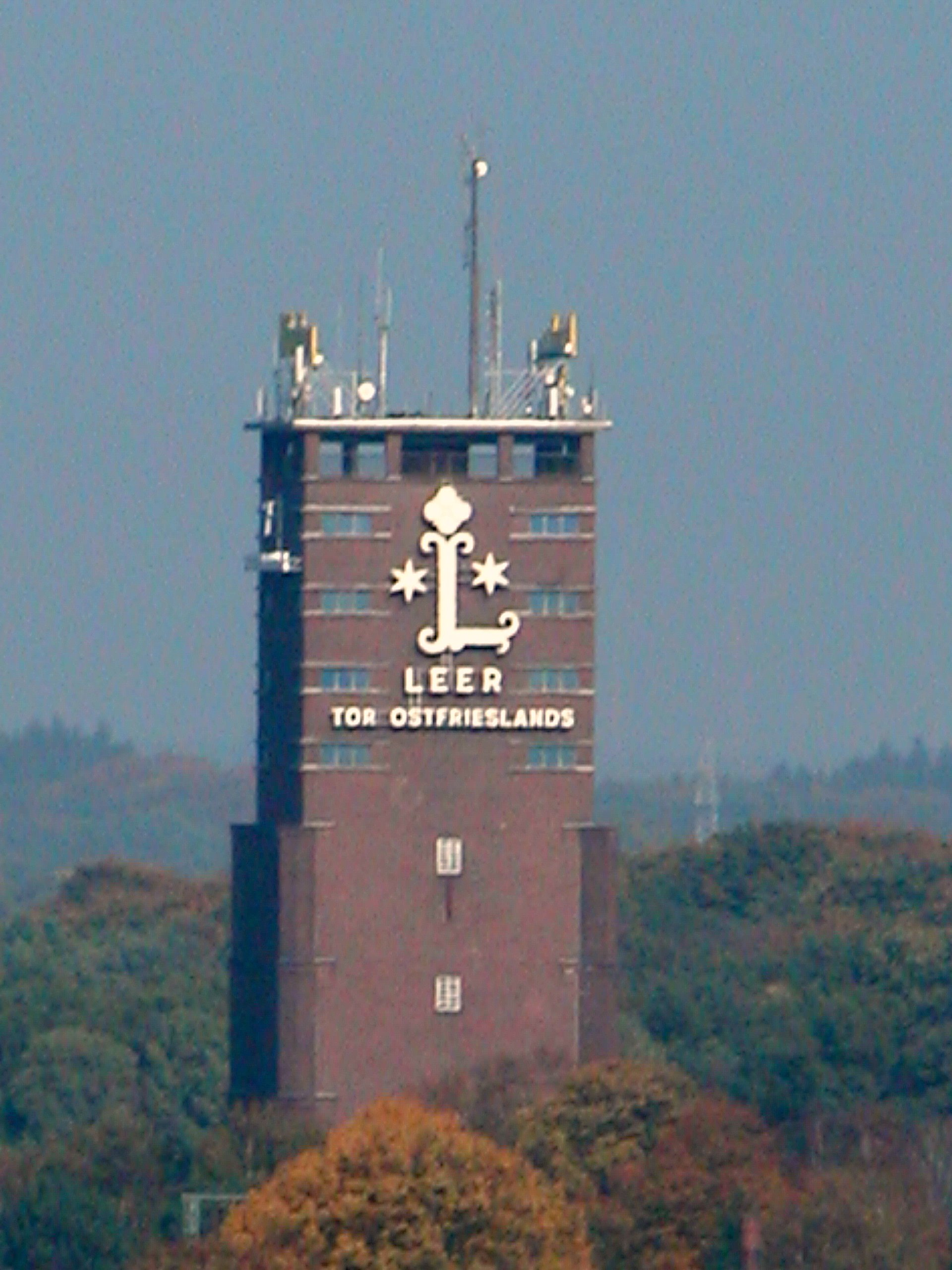 Leer – „Tor Ostfrieslands“.